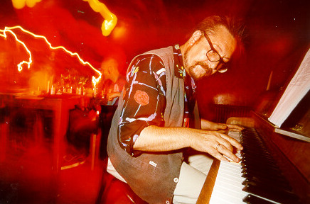 Manfred Maurenbrecher bei der Reformbühme Heim und Welt 1998